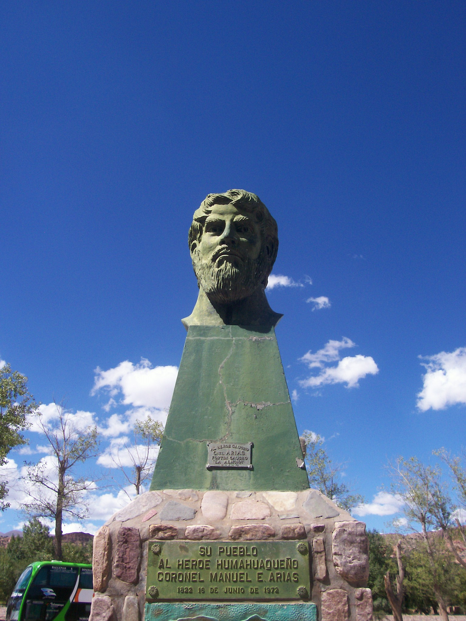 Busto de Manuel Arias en Humahuaca, Jujuy.